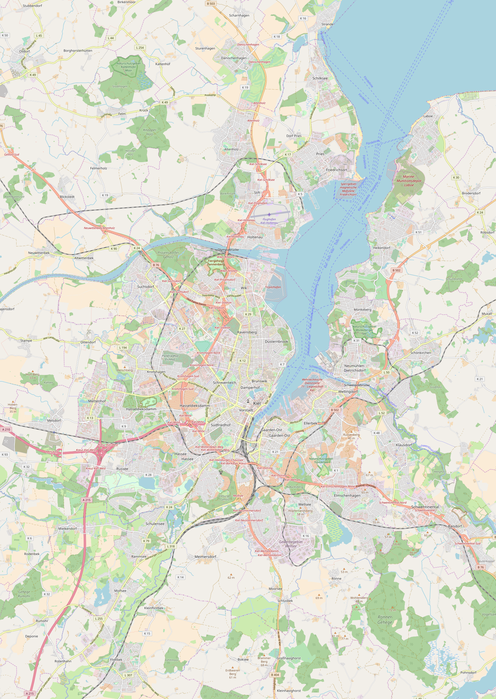 Karte von Kiel This map may be incomplete, and may contain errors. Don't rely solely on it for navigation.